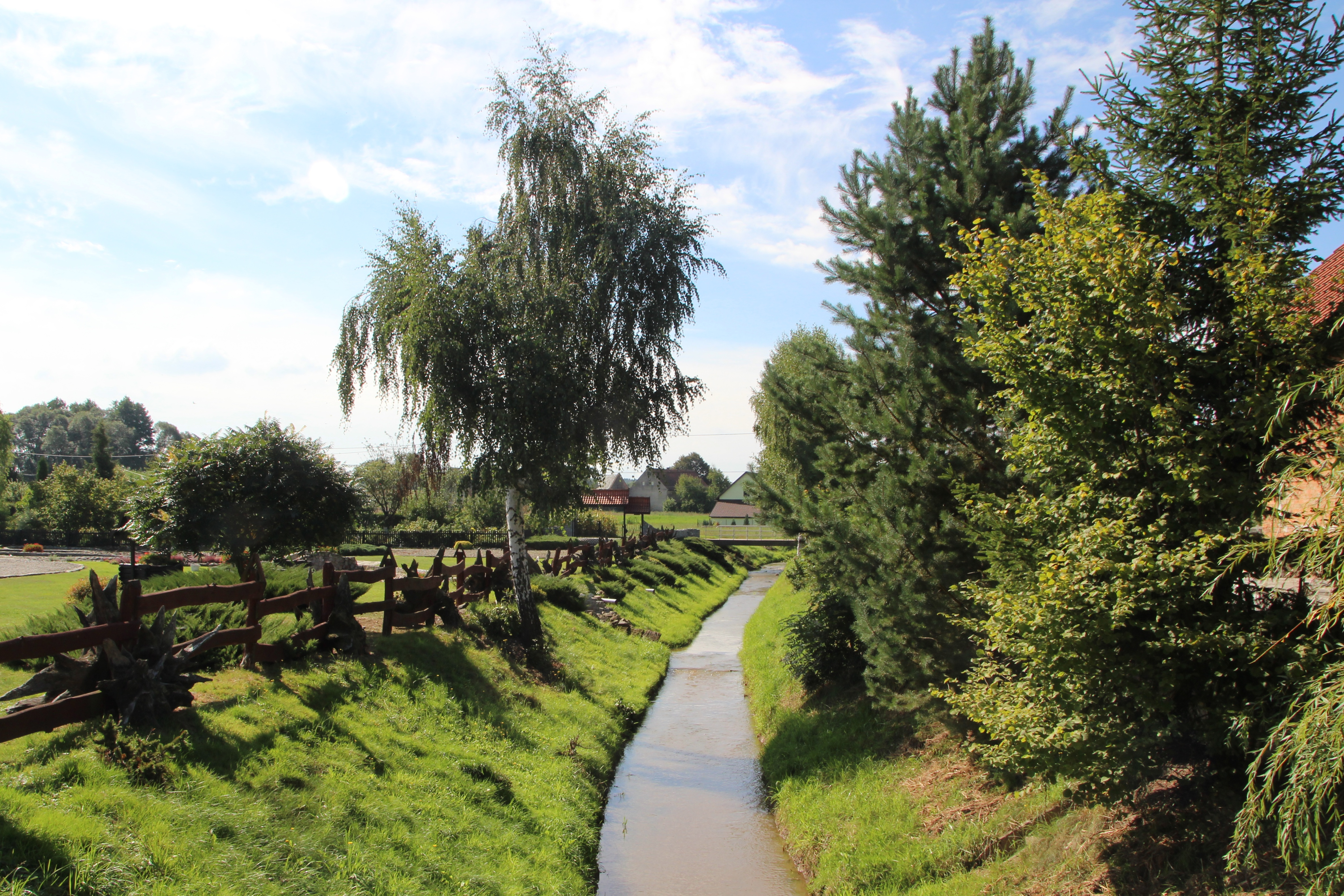 Szklary – wieś w Polsce położona w województwie opolskim, w powiecie nyskim, w gminie Kamiennik.